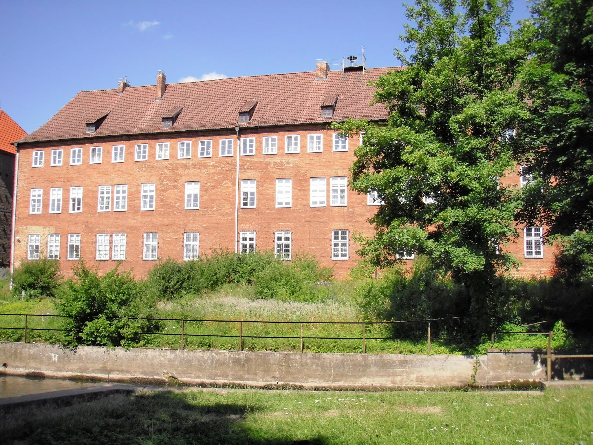 Lębork, obszar Starego Miasta, XIII